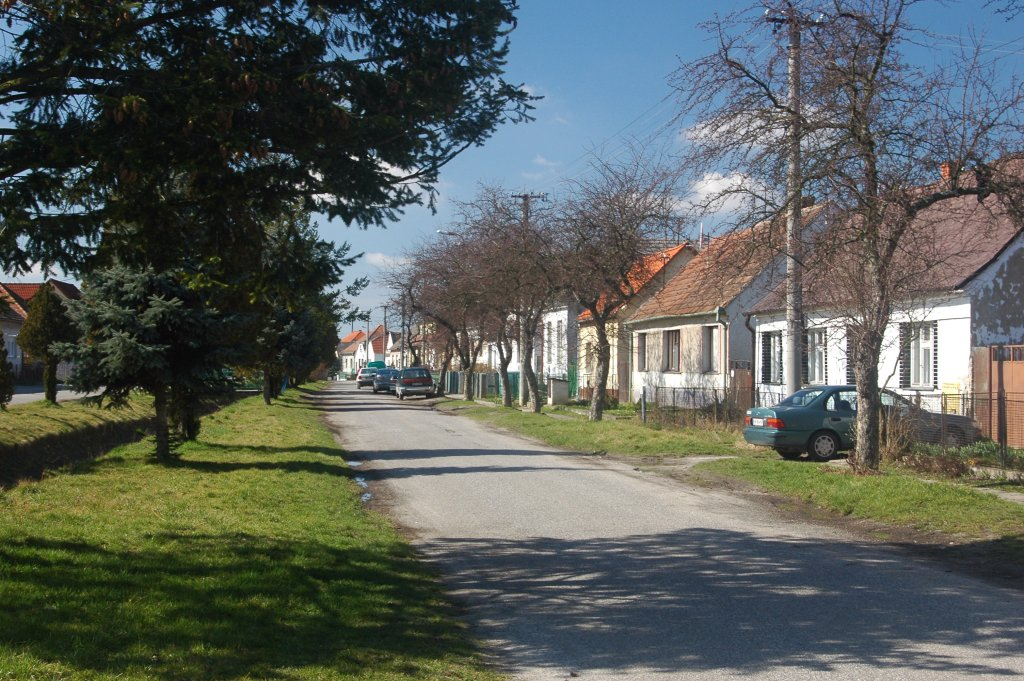 Dojč, street